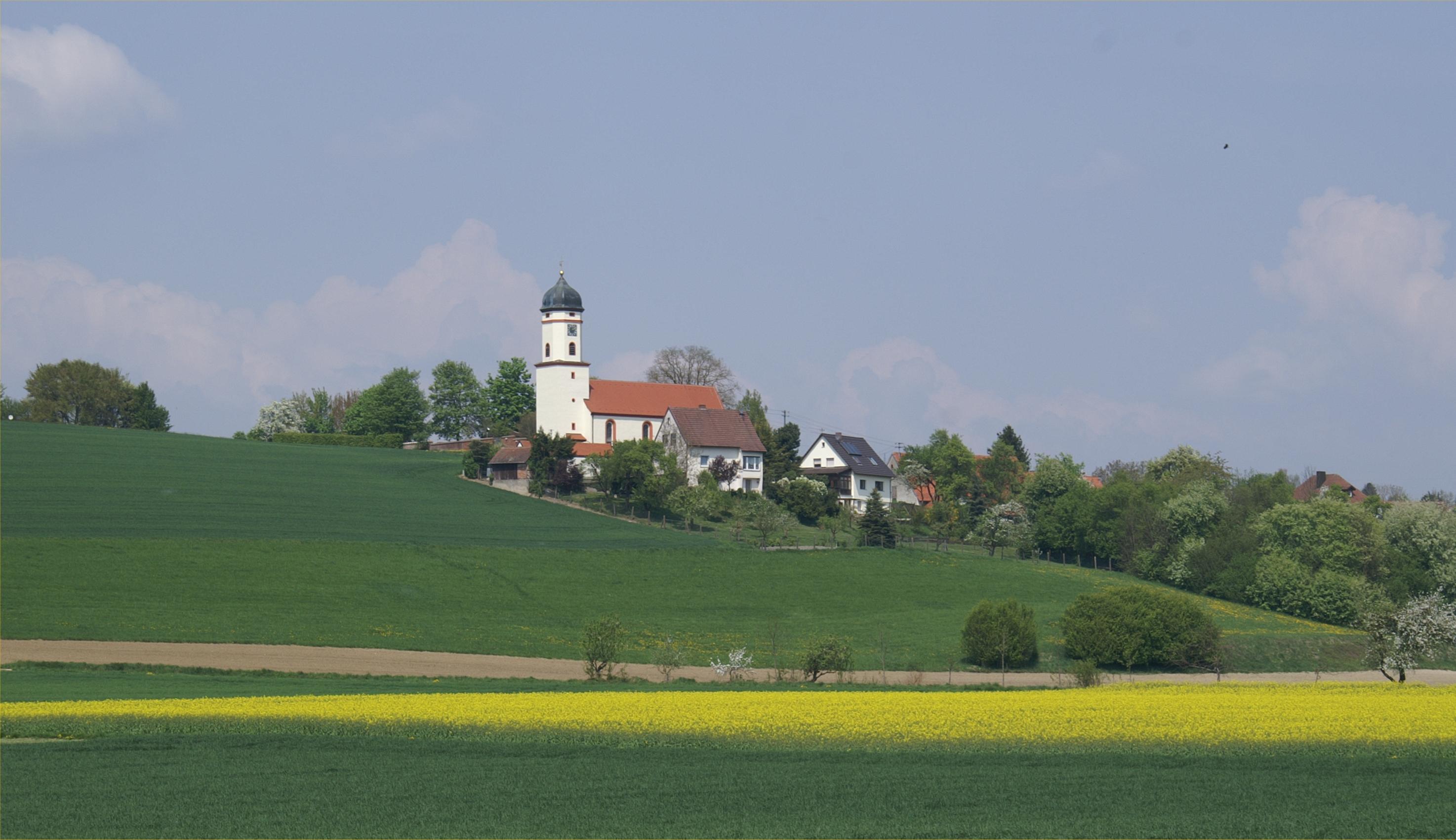 Donaurieden, Stadt Erbach, Alb-Donau-Kreis